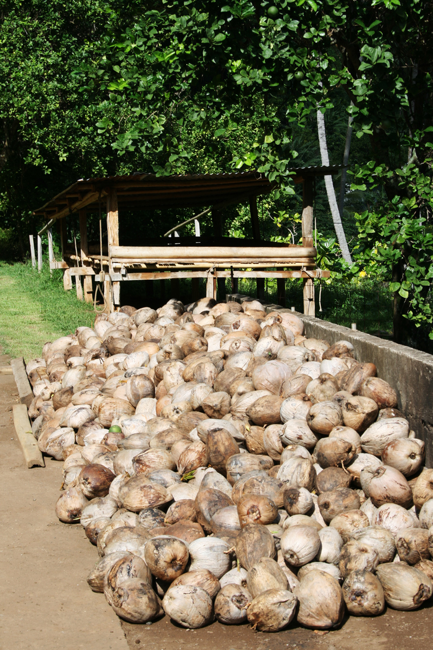 Sechoir à copra à Fatu Hiva